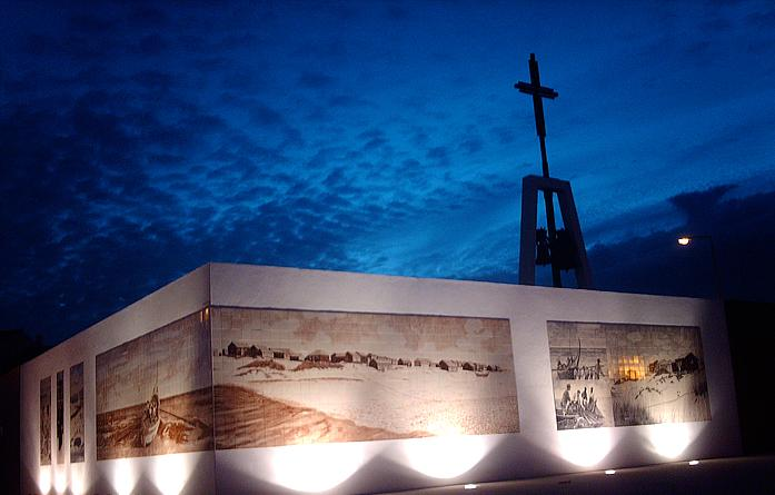 Pequena Igreja em Estilo moderno na praia da Tocha